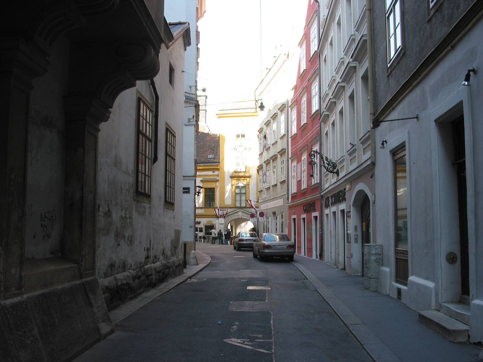 Schönlaterngasse, Vienna, 2005-10-16 selfmade photo